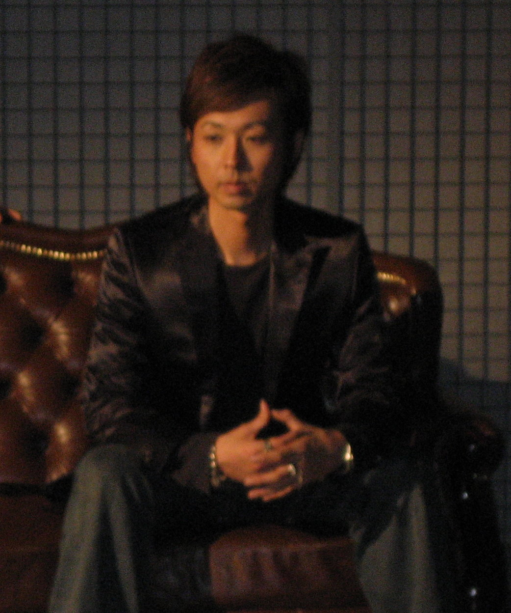 アーティスト福間剛